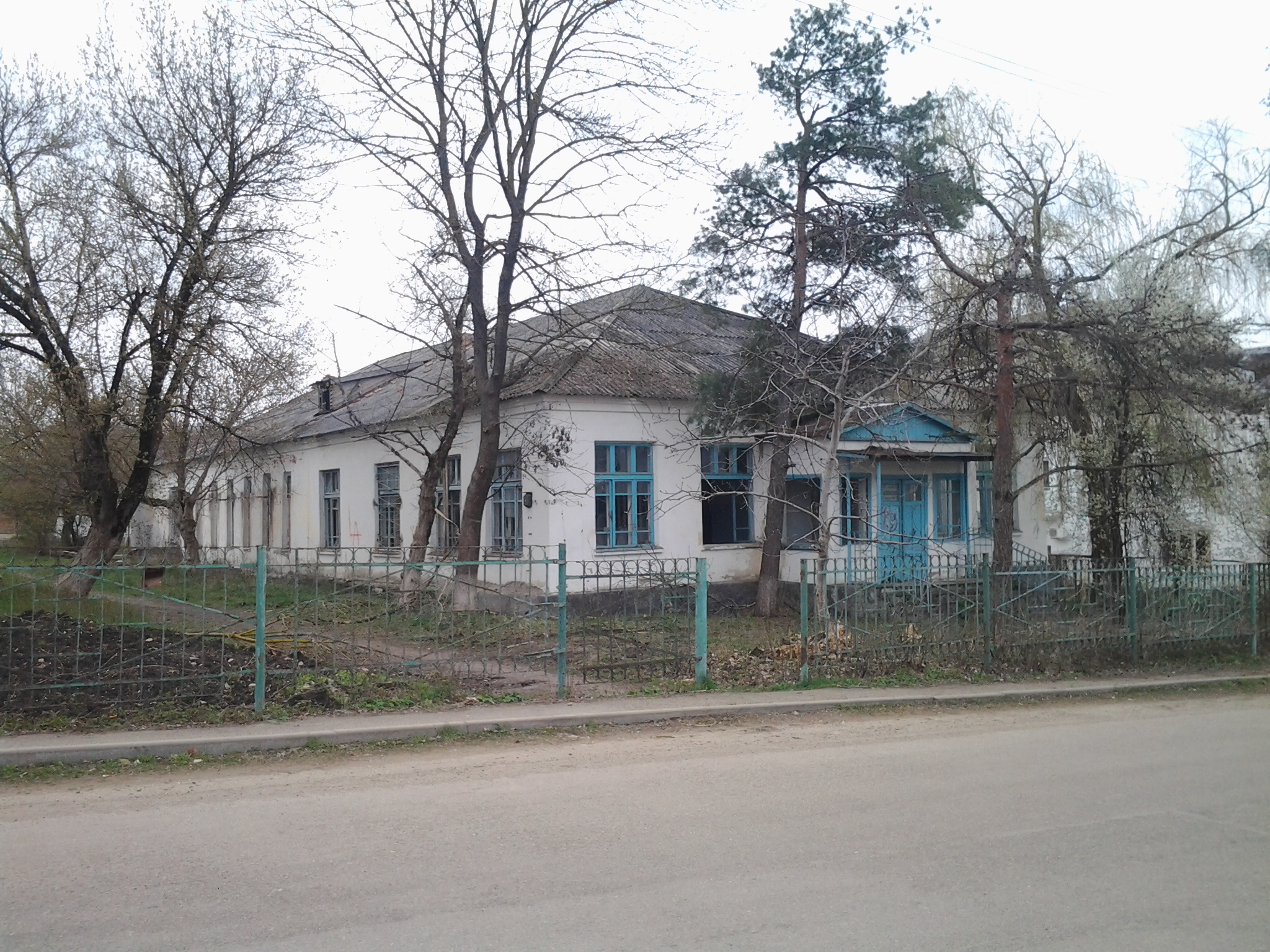 Водолечебница поселка Черноморского